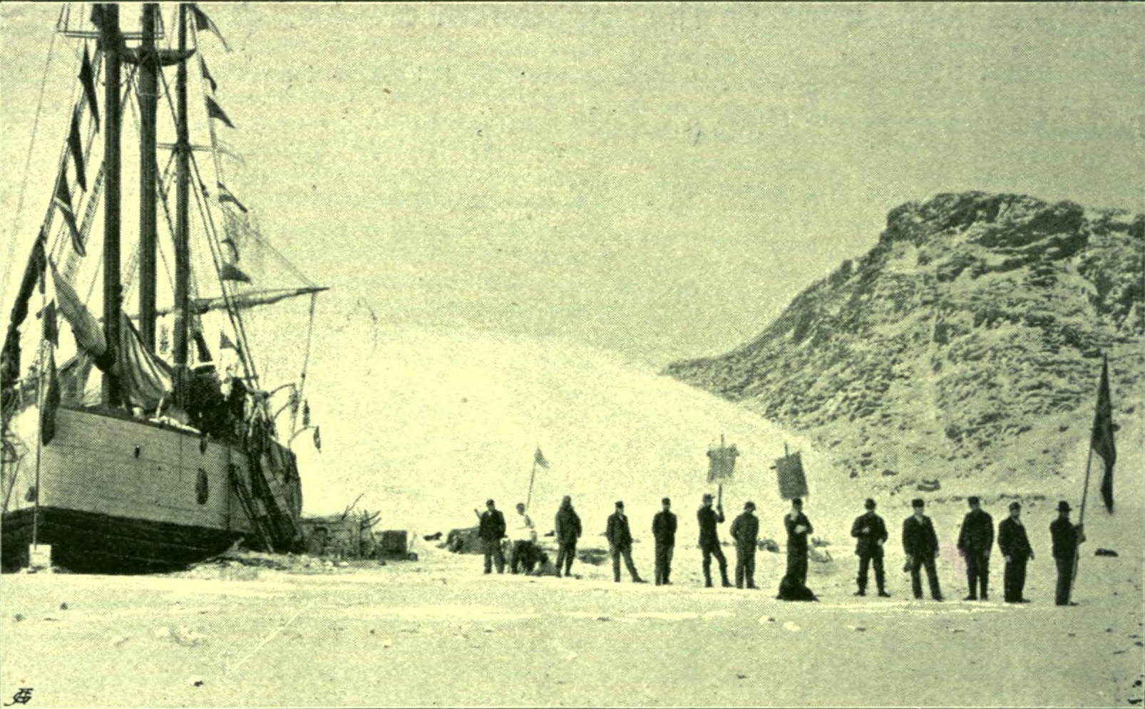 Празднование дня независимости Норвегии участниками норвежской арктической экспедиции.